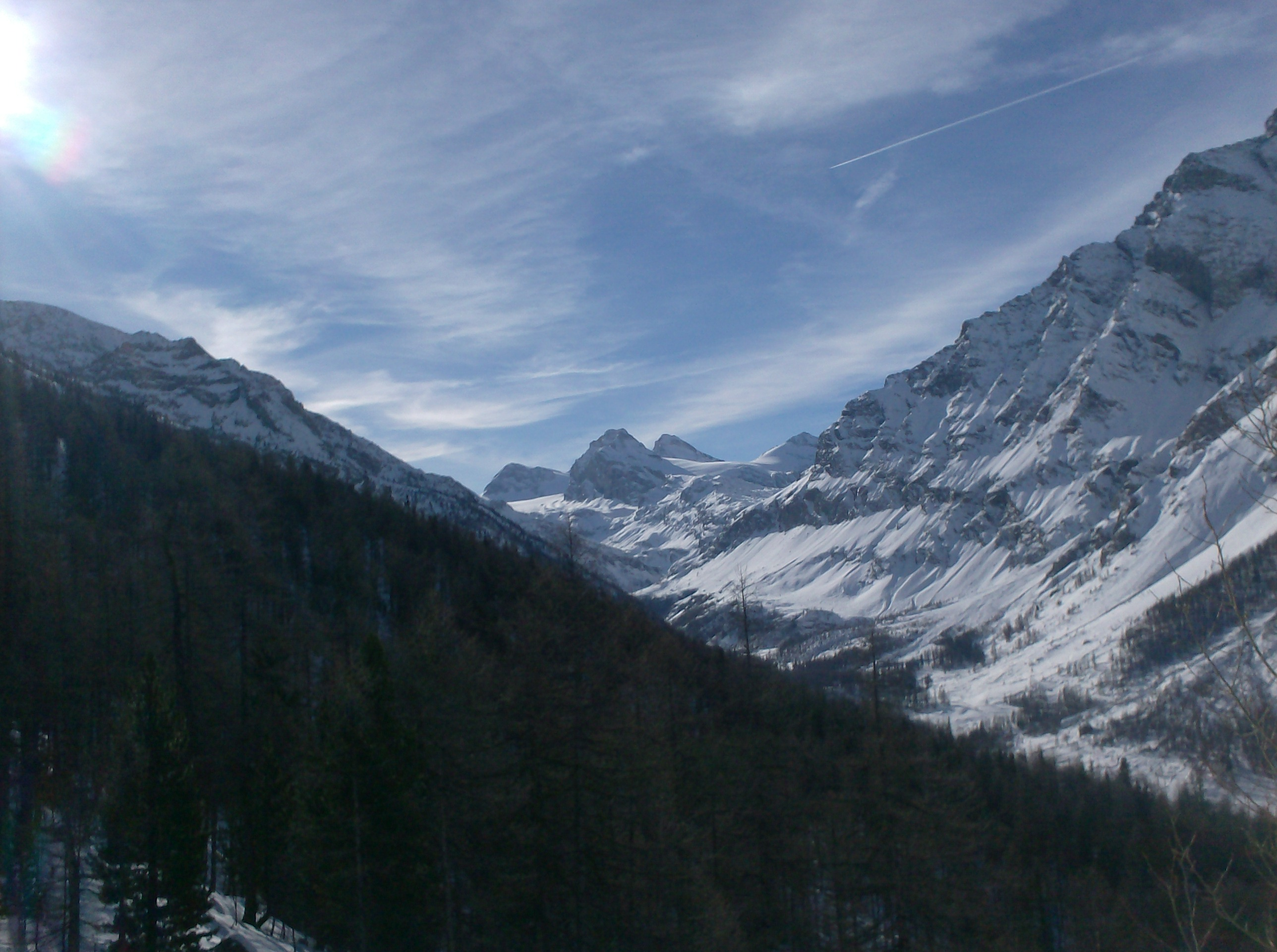 Val di Rhemes